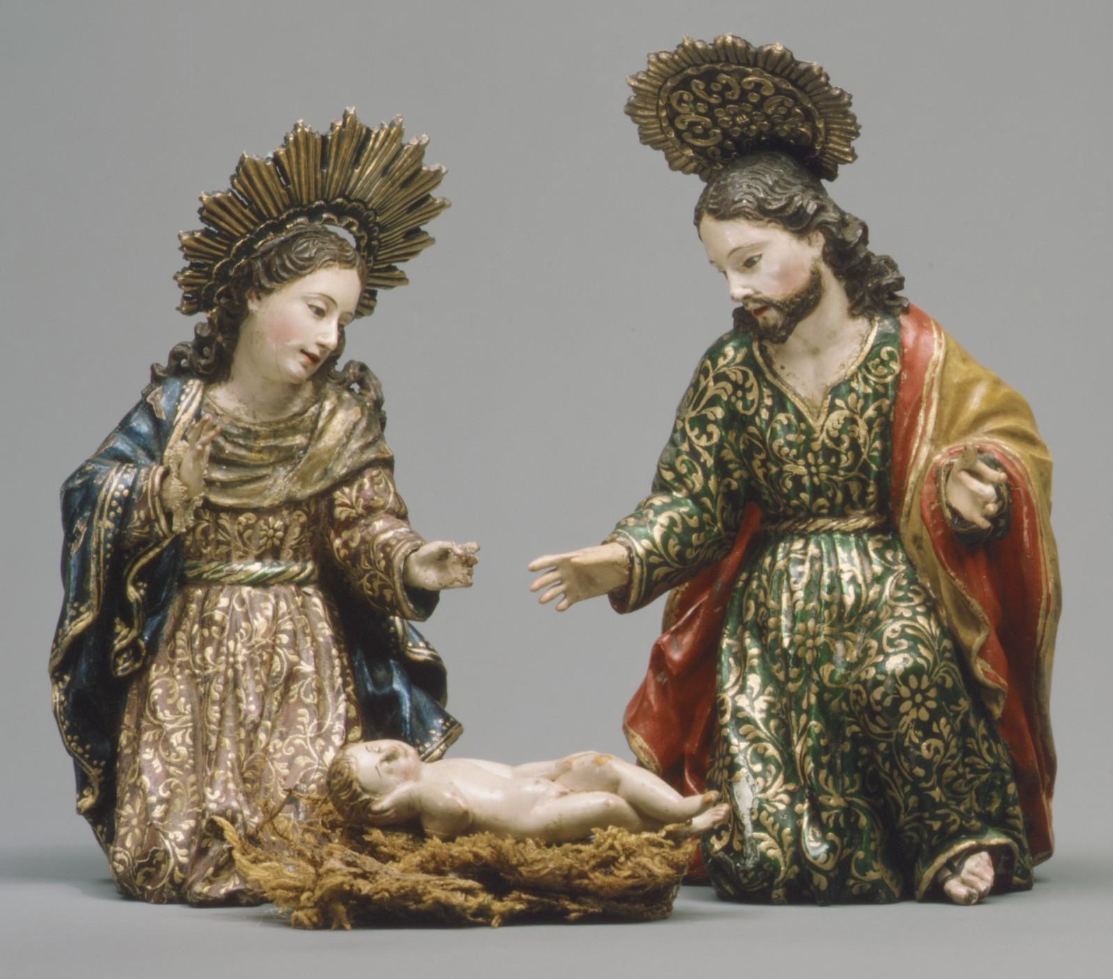 Ecuadoran; Statuette; Sculpture